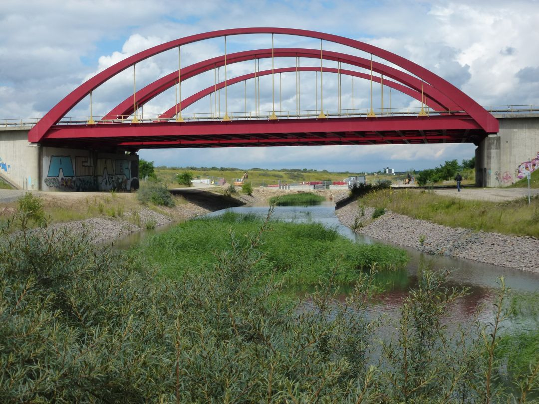 Verbindung des Störmthaler Sees mit dem Markkleeberger See mit Brücke der A 38